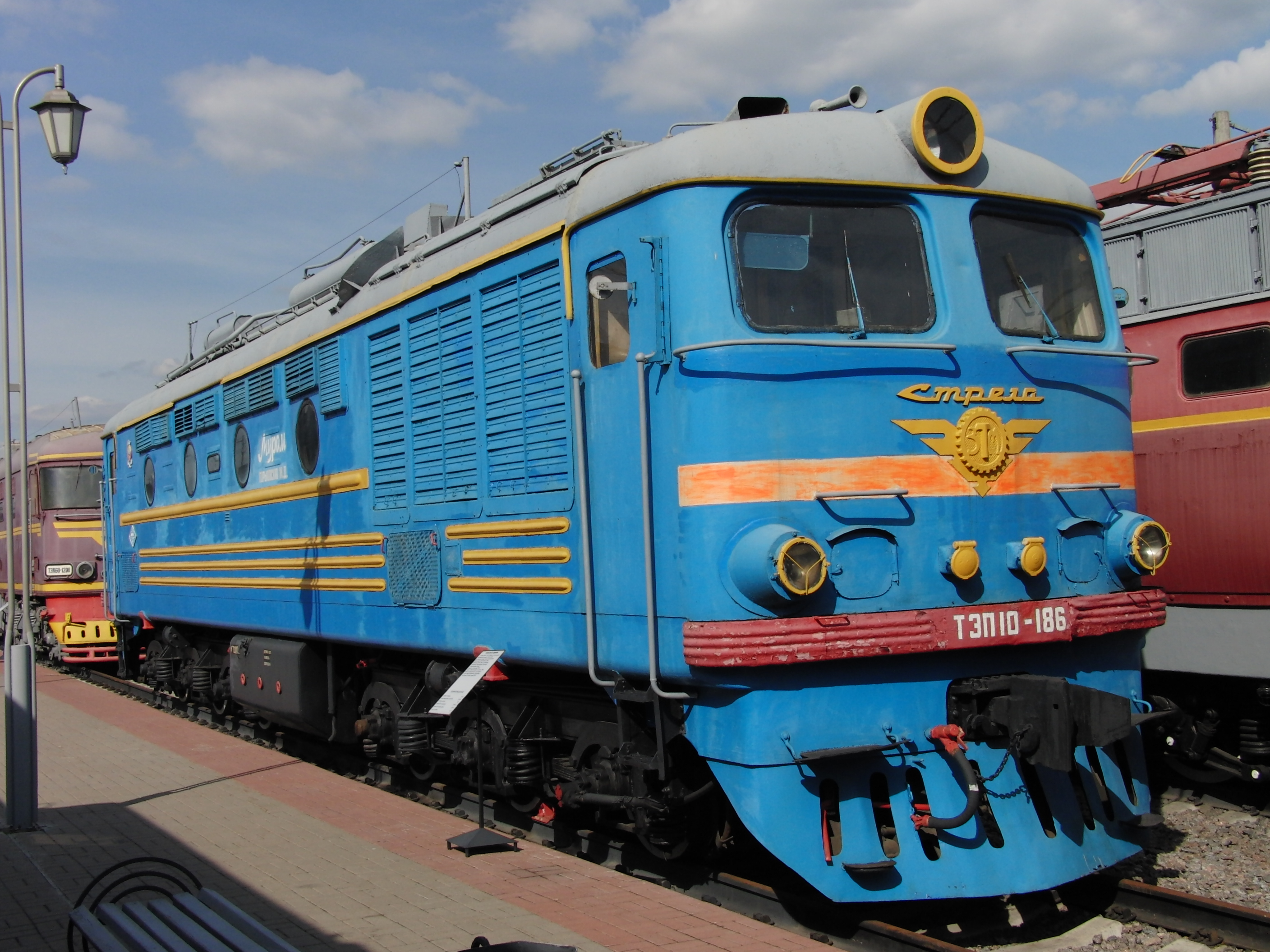 TEP10-186 (ТЭП10-186) diesel locomotive